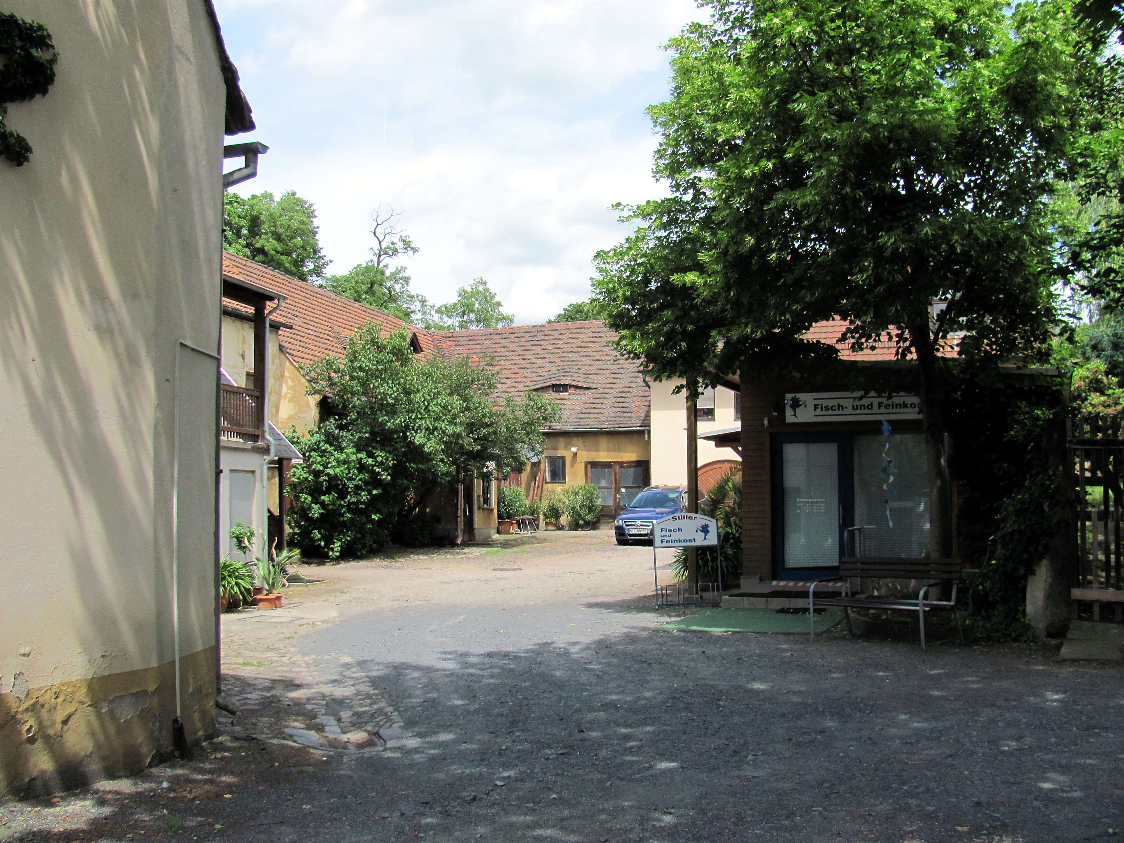 Radebeul-Serkowitz, Gasthof „Weißes Roß“